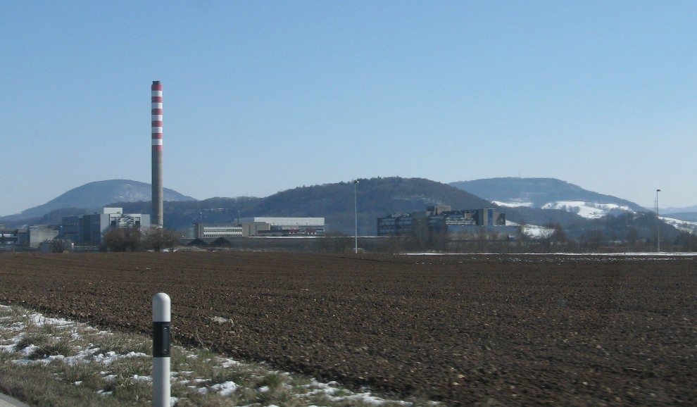 Schinberg links über das Werk der DSM in Sisseln gesehen, rechts der Frickberg